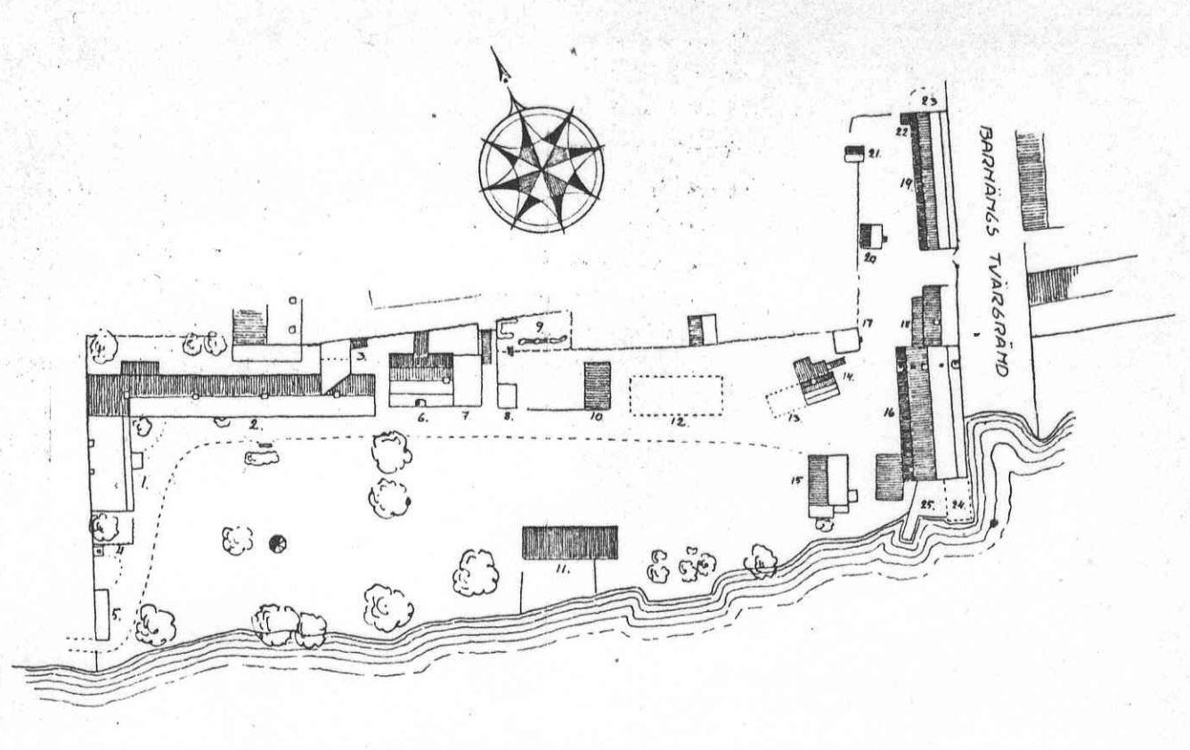 Färgargården vid Hammarby sjö, situationsplan: 1+2: Boningshus 4: Pump 6: Presshus 7: Vedbod 8: Bod 9: Trädgård 10 + 11: Bodar 14: Boningshus 16: Färgeribyggnaden 17: Svavelkammaren 18: Boningshua 19: Stall 20 + 21: Bodar